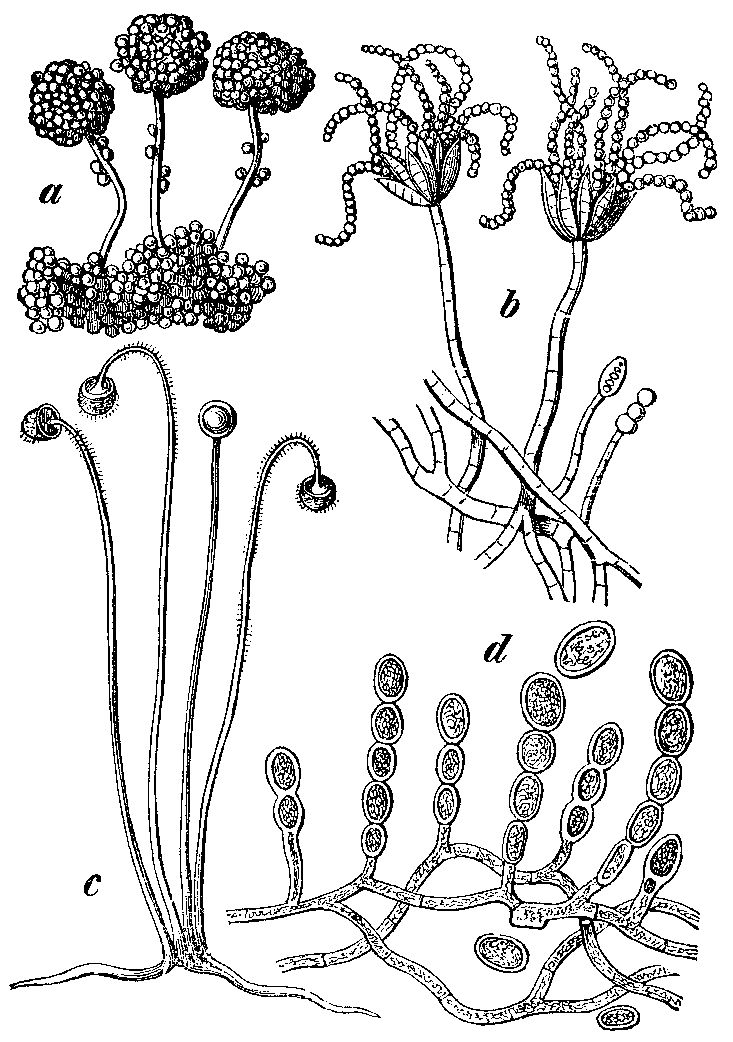 Slika 151. Plesni: a) sivozelena batasta plesen (Aspergíllus glaucus), b) sivozelena ščetasta plesen (Penicíllium glaucum), c) glavičasta plesen (Múcor mucédo), d) Oidium Tuckéri.